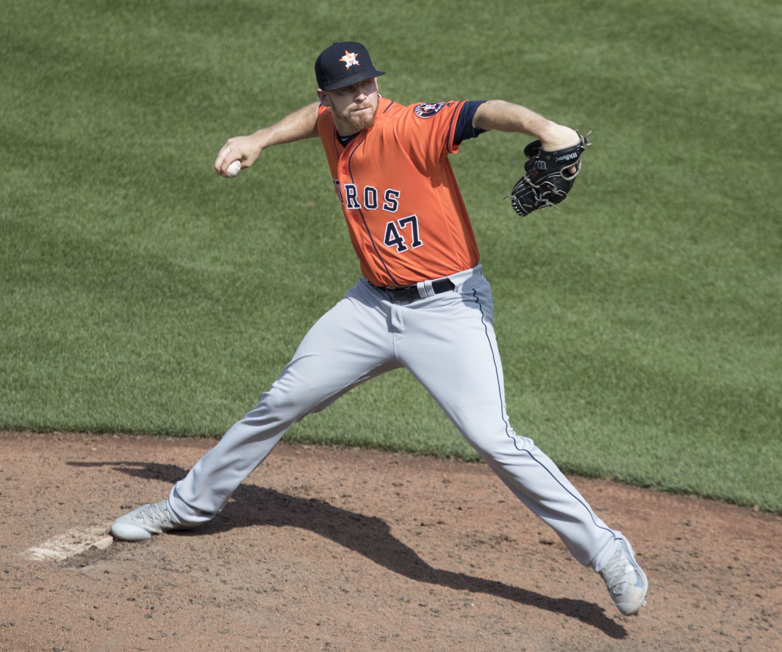 Astros at Orioles 7/23/17